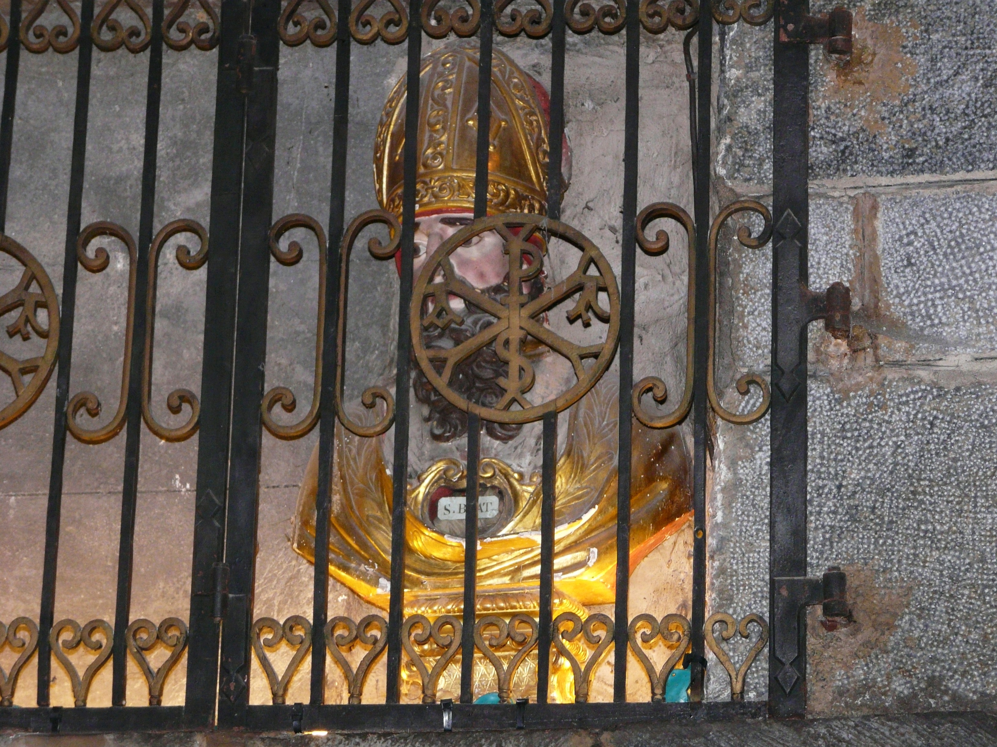 Buste de saint Béat, église Saint-Béat Saint-Privat, Saint-Béat, Haute-Garonne, France.